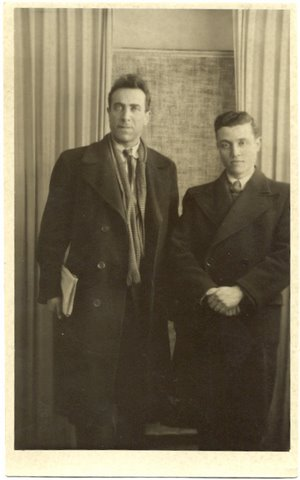 הסופר המשורר אברהם נחום שטנצל היה אחיו של הגאון מסוסנוביץ